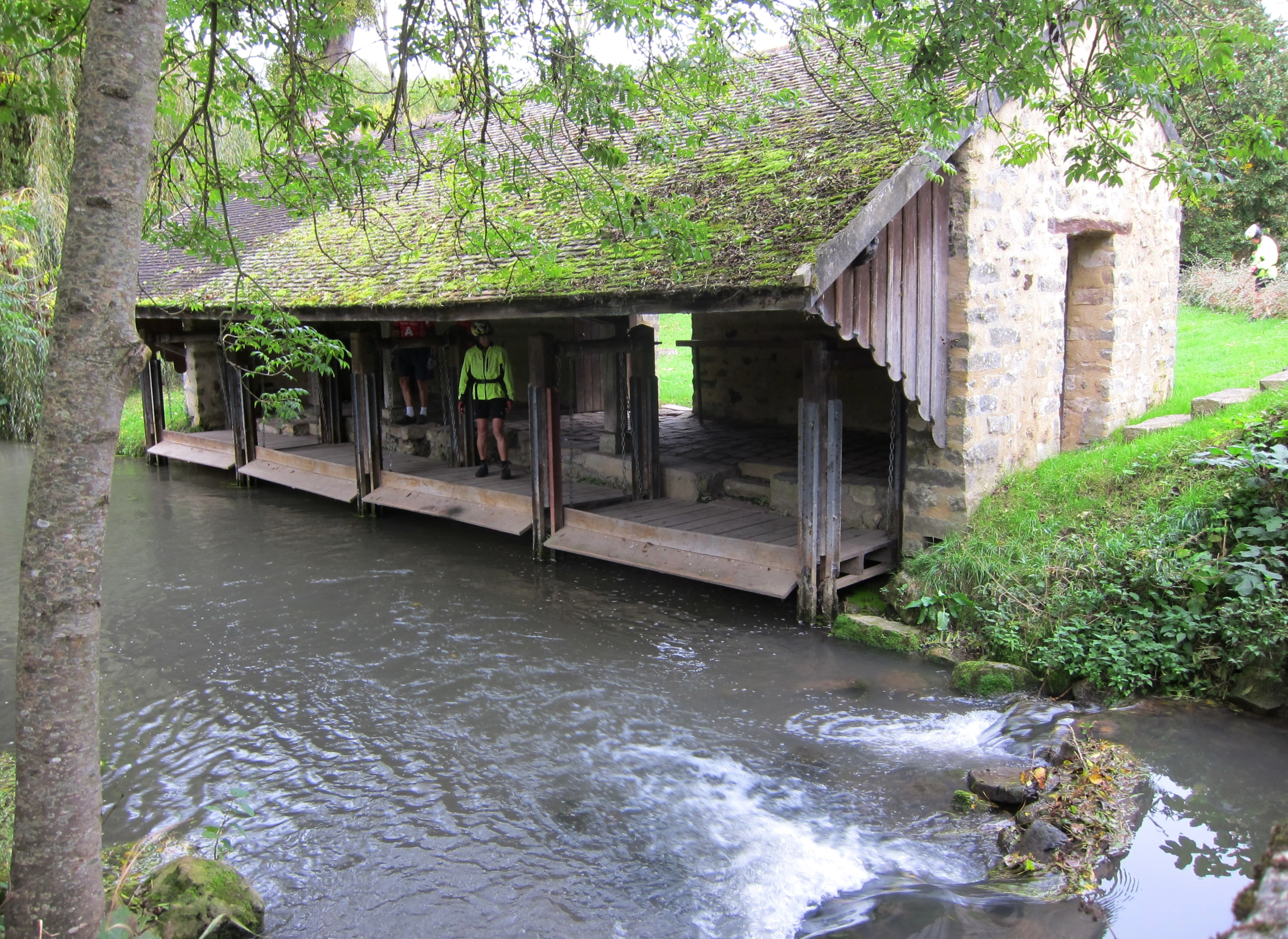 Lavior near Dormelles